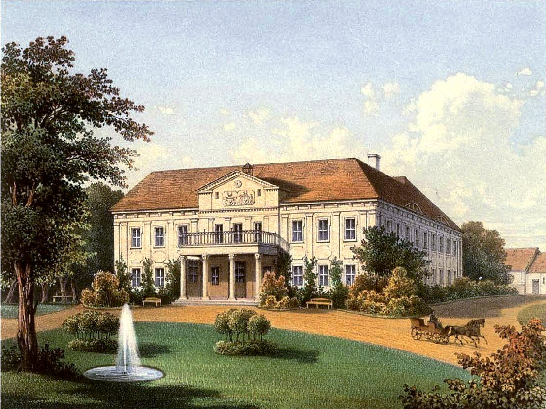 Schloss Quaritz, Kreis Glogau, Provinz Schlesien, Lithografie aus dem 19. Jahrhundert